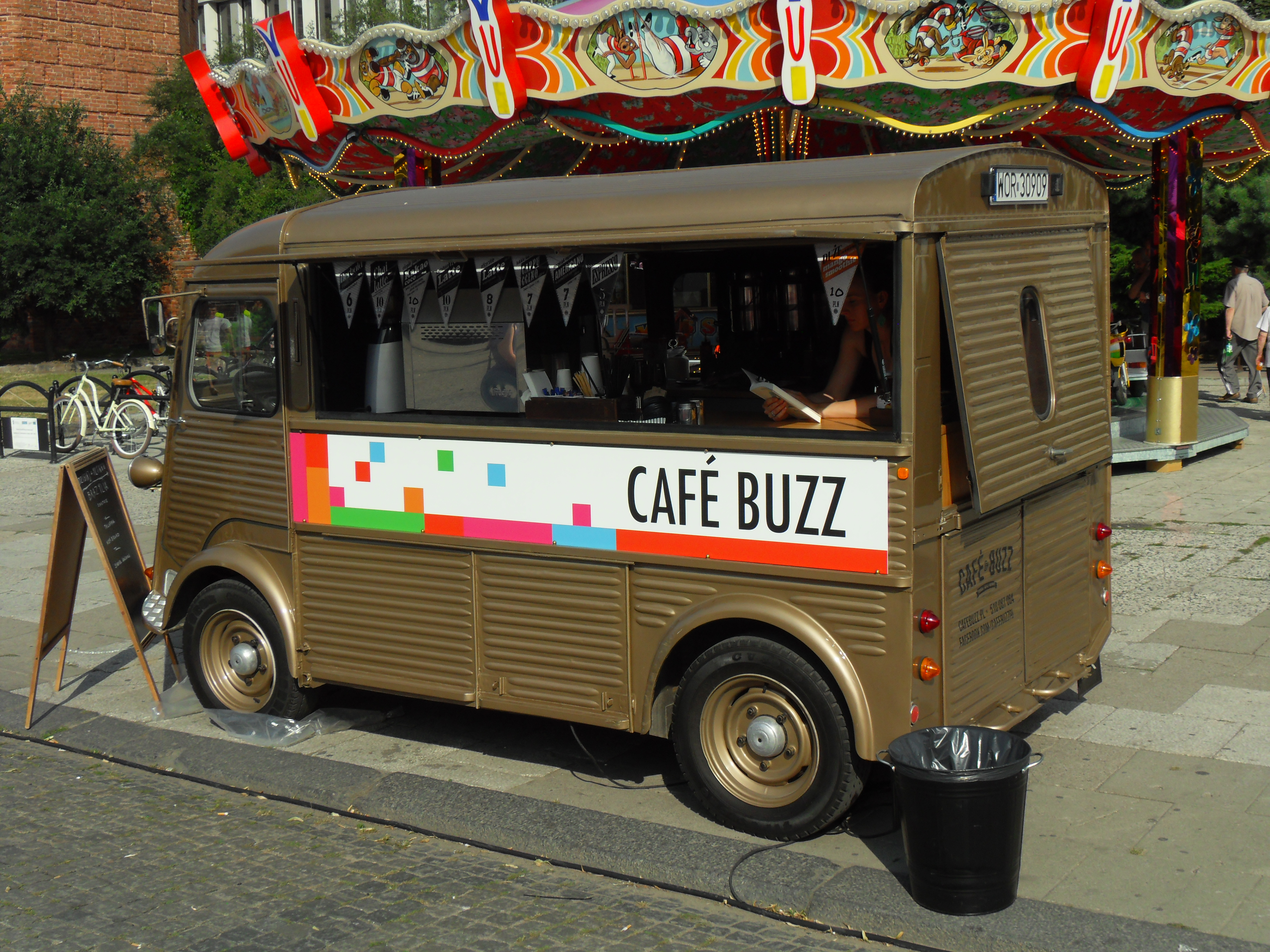 Café Buzz w Gdańsku, Targ Węglowy.